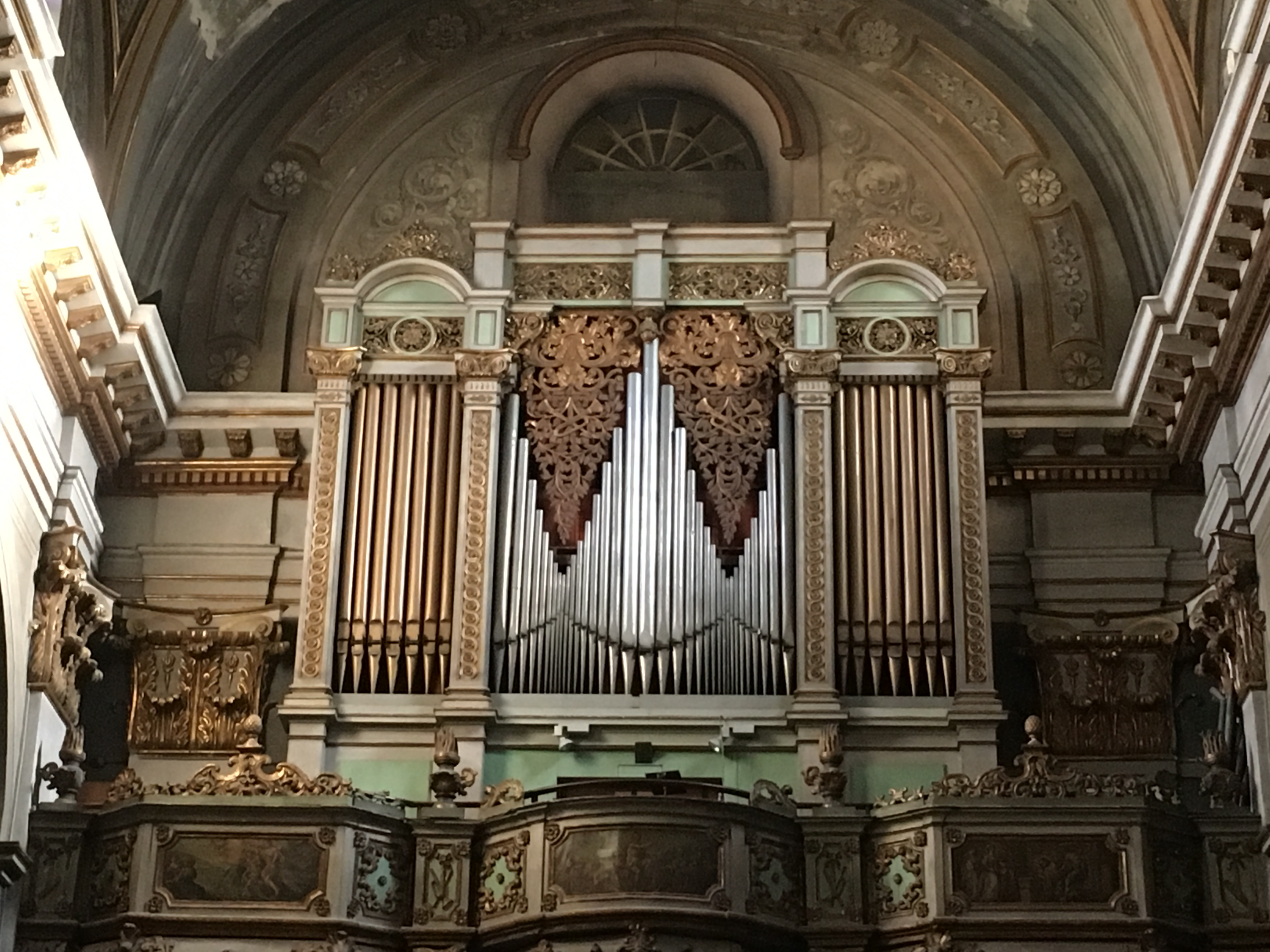 Organo della chiesa S. Giovanni Battista, Bastia